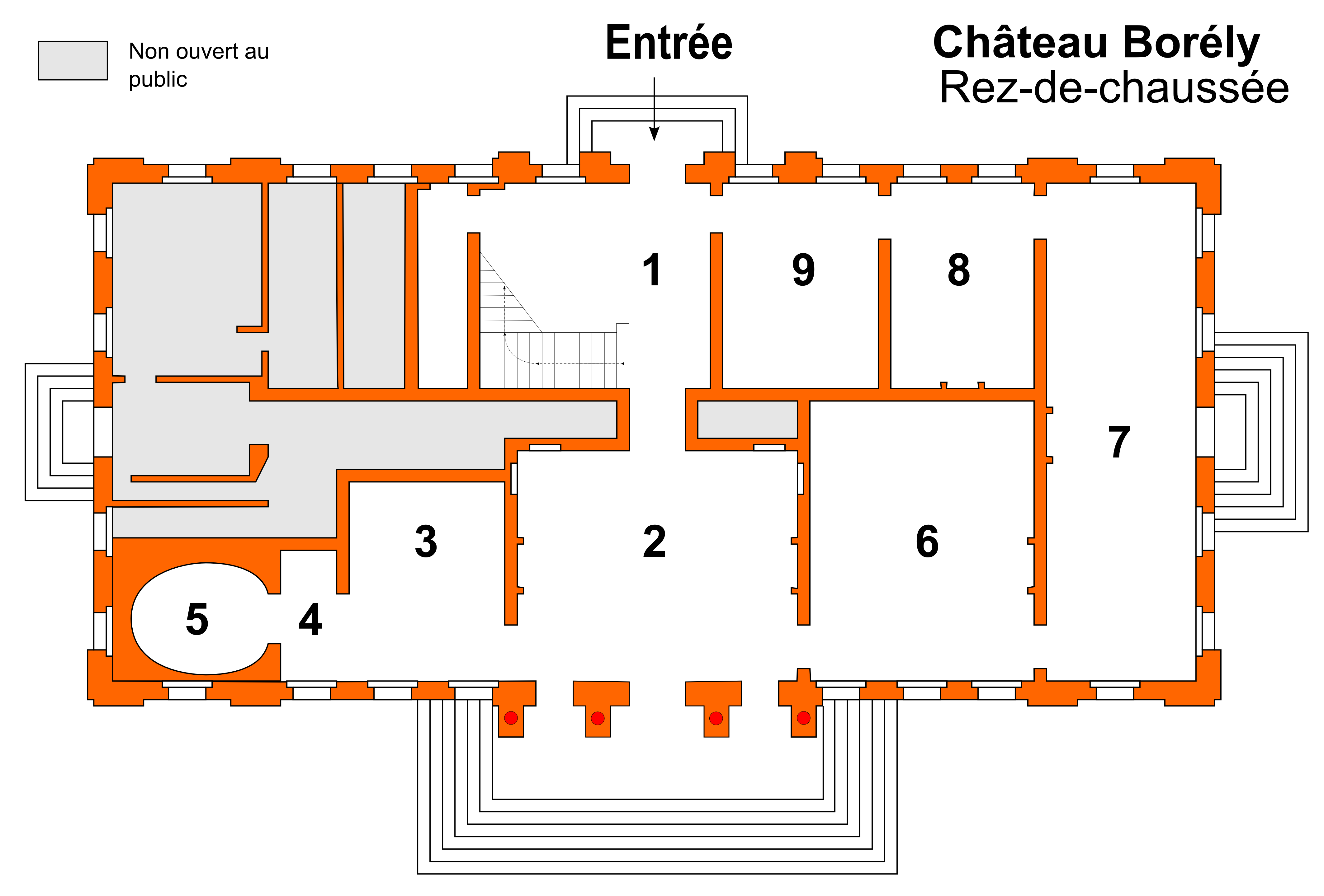 Plan du Rez-de-chaussée du château Borély à Marseille où se trouve le Musée des Arts décoratifs de la faïence et de la Mode, réalisé avec Inkscape à partir du plan du musée et d'autres plan : A.Saurel dans Le musée d'archéologie de Marseille et dessin de la façade par l'atelier du patrimoine de Marseille